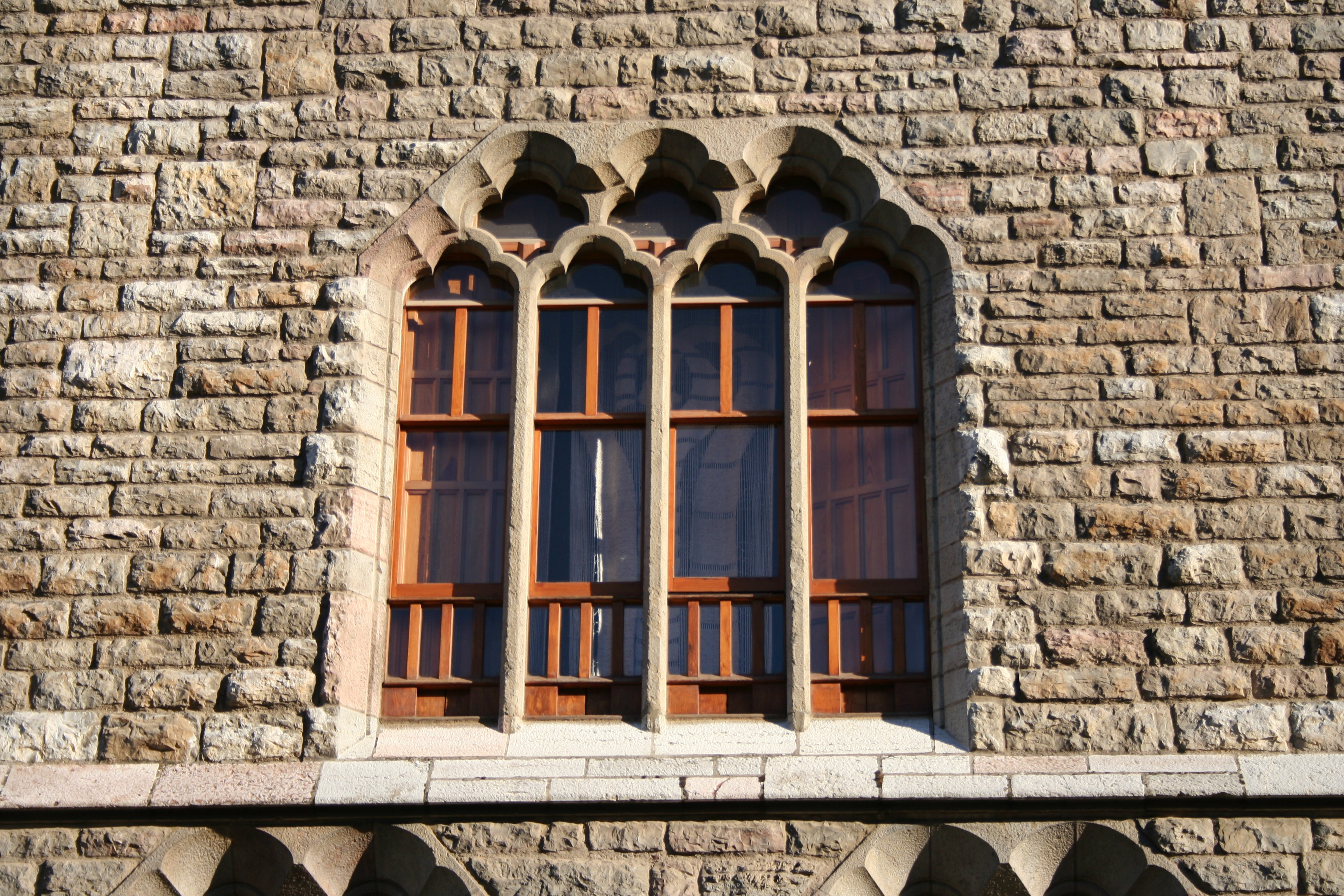 Detalle de la Casa Botines